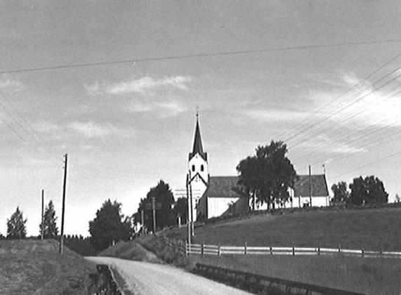 Hegra kyrkje